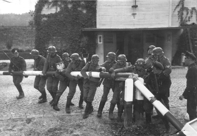 1 IX 1939 Niemcy bez wypowiedzenia wojny rozpoczęły działania zbrojne przeciwko Polsce. Z zachodu, północy i południa skierowano na Polskę 1,8 mln żołnierzy, 3 tys. czołgów i 2 tys. samolotów. Armia polska dysponowała 850 tys. ludzi (w pierwszym rzucie), 266 czołgami i 400 samolotami. Przewaga niemiecka była miażdżąca pod każdym względem, zwłaszcza zaś pod względem uzbrojenia i wyposażenia technicznego. Sygnałem do rozpoczęcia działań wojskowych były salwy pancernika “Schleswig-Holstein” na Westerplatte. Atak ów stał się początkiem II wojny światowej, a operacja niemiecka i obrona polska aż do upadku Rzeczypospolitej określana jest w historiografii “kampanią wrześniową”. Niemcy już w pierwszych dniach walki przełamali linię polskiej obrony i zajęli Śląsk, Pomorze i część Wielkopolski. Marszałek Edward Śmigły-Rydz wydał 6 września rozkaz wycofania oddziałów na linię Wisły i Sanu. Stolicę opuścili prezydent i rząd RP. Wojska niemieckie 8 września znalazły się na przedmieściach Warszawy. Lokalizacja: Ze zbiorów Archiwum Dokumentacji Mechanicznej Opis zewnętrzny: fotografia czarno-biała o formacie 13x18 cm Miejsce przechowywania: Archiwum Dokumentacji Mechanicznej, Zespół IKP Autor komentarza: Urszula Wieczorek Autor fotografii: Hans Sönnke